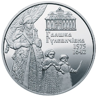 Монета Галшка Гулевичівна реверс